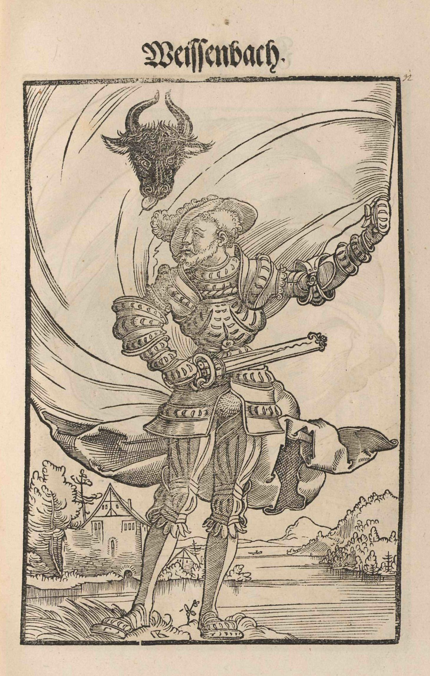 Jacob Koebel (Vorrede): Wapen. Des Heyligen Römischen Reichs Teutscher nation. Gedruckt bei Cyriacus Jacob (evtl. auch Herausgeber/Autor), Frankfurt am Main 1545, Holzschnitte von Jacob Kallenberg. Zu Angaben zur Tingierung (Farbgebung) der Wappen siehe das Register ab Bild Nr. 165. Weissenbach (Ritter von Weißenbach, Weißbach bei Schmölln/Thüringen)